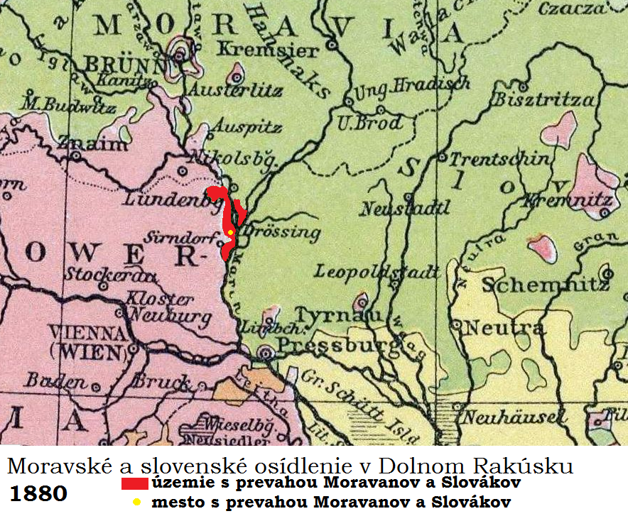 Moravské a slovenské osídlenie v dolnorakúskom Pomoraví (Moravské pole - Marchfeld).